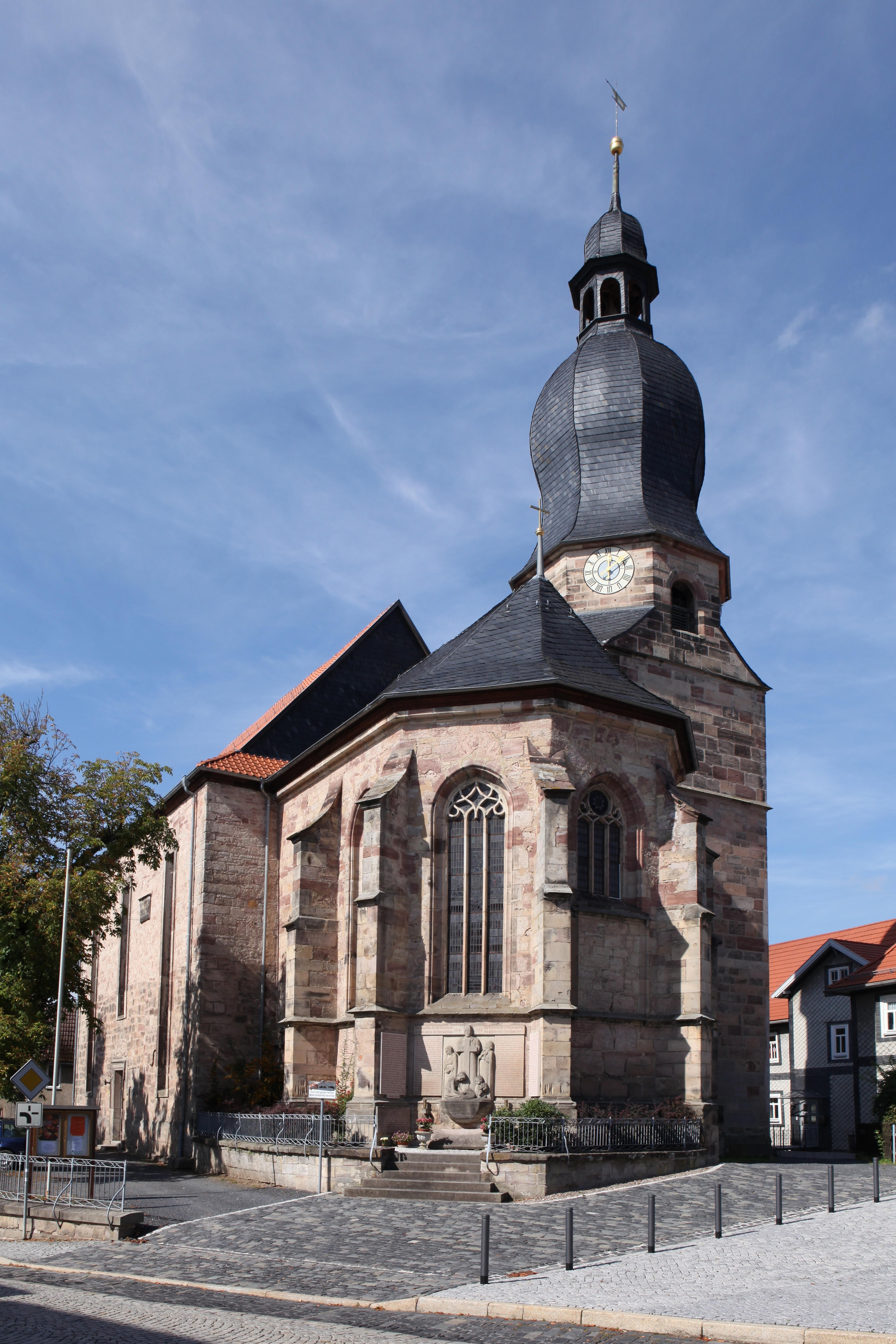 Evangelisch-lutherische Kirche St. Johannis in Schalkau, Kirchplatz 1